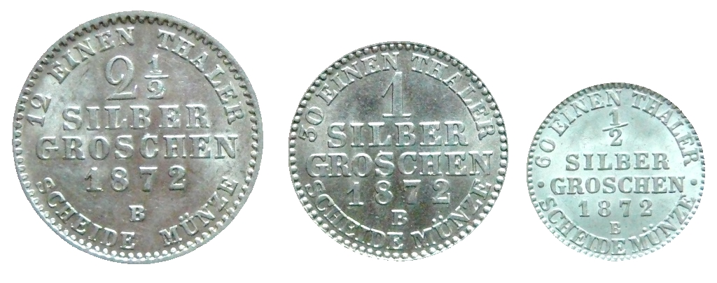 Silbergroschen Königreich Preußen 1872 Revers